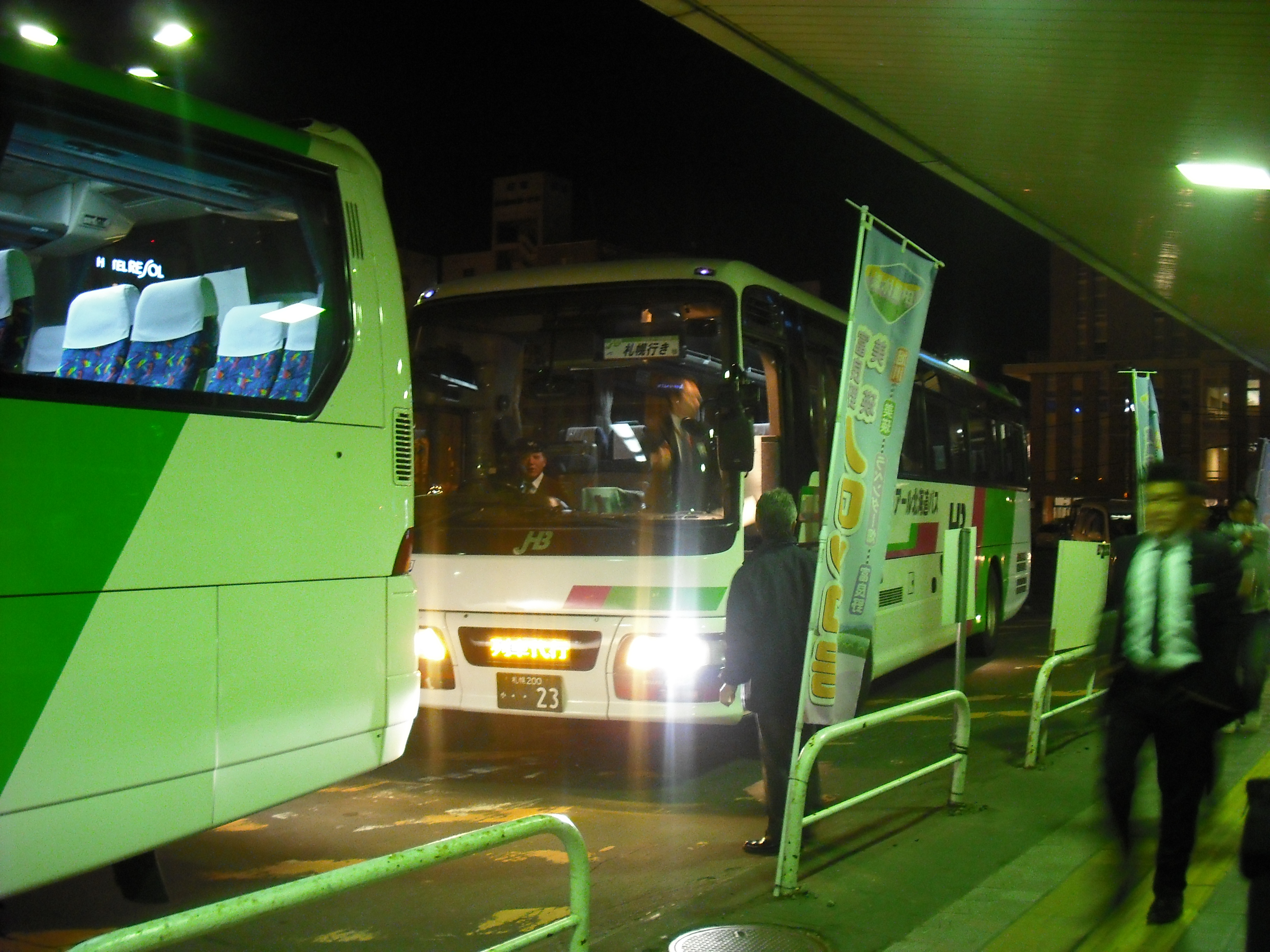 列車代行バス、旭川駅発札幌行き（旭川駅高架に伴う臨時代行バス）